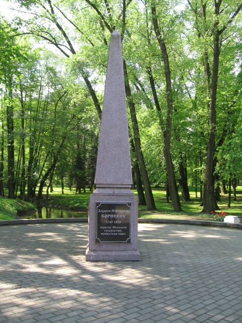 Памятник Корнееву З.Я.(1748-1828), первому губернатору Минска, в парке Горького, Минск.